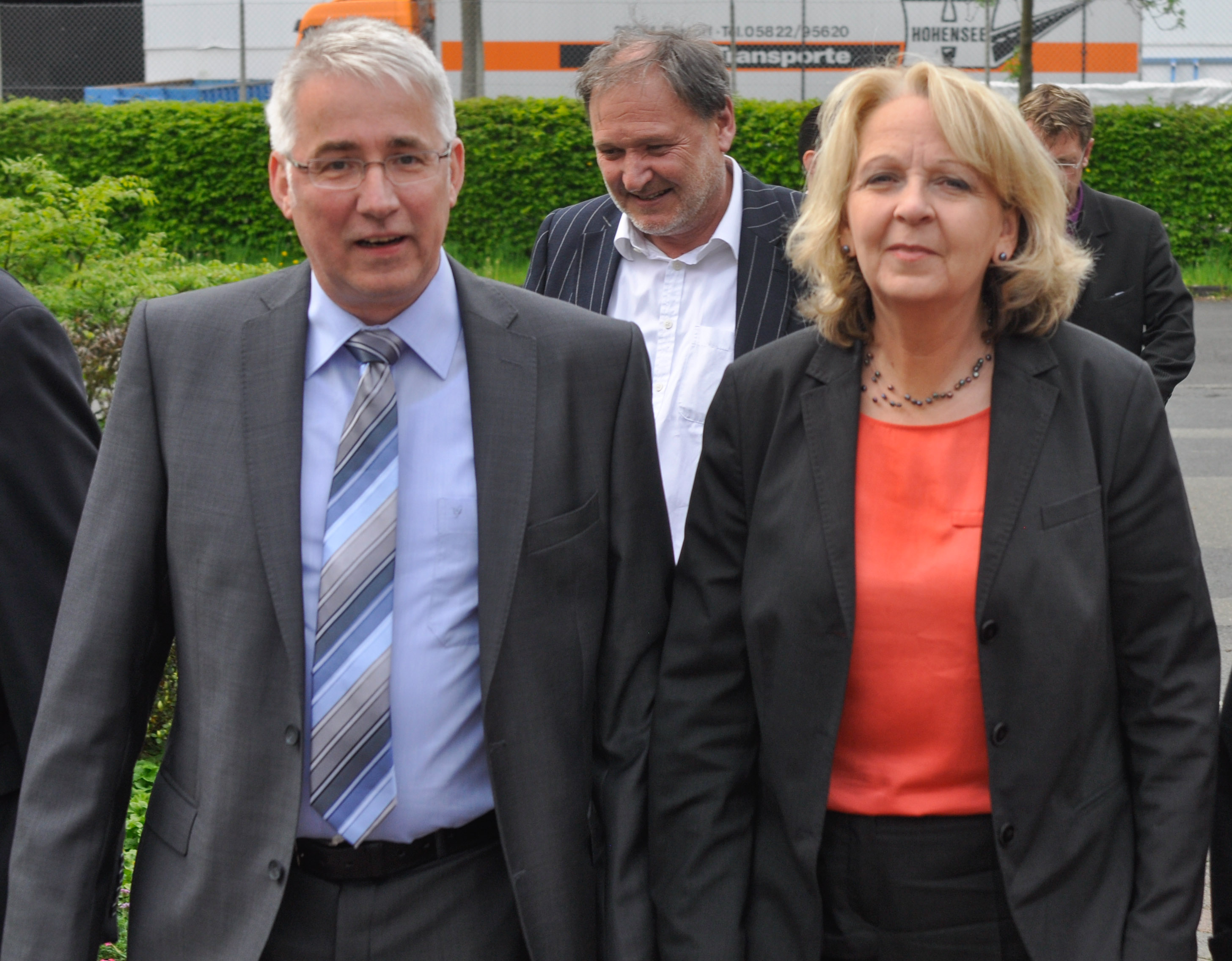 Falk Heinrichs (MdL) zusammen mit NRW Ministerpräsidentin Hannelore Kraft vor den AWO Zentrum in Netphen-Deuz